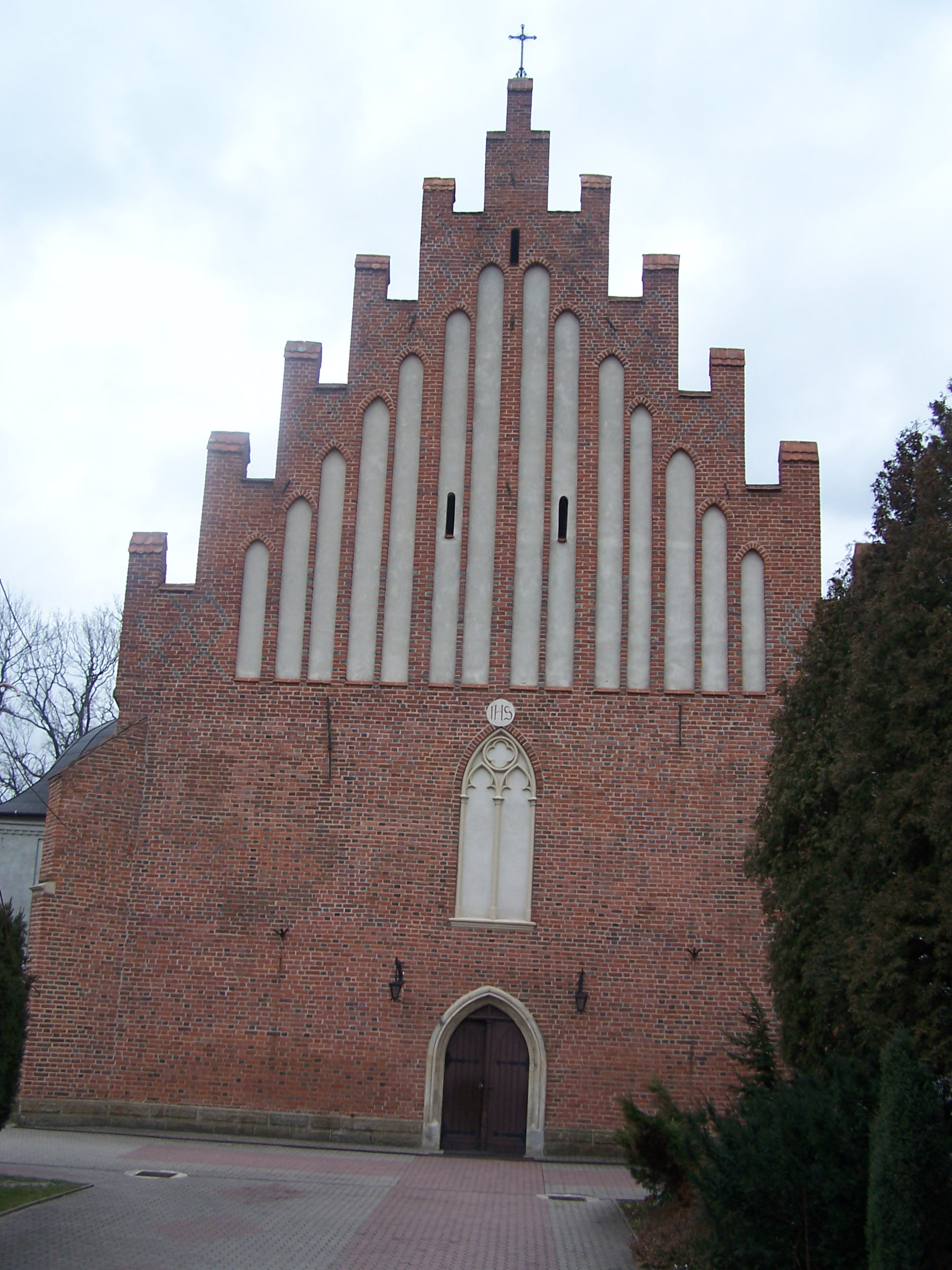 Fasada kościoła oo. Bernardynów pw. św. Barbary w Przeworsku.